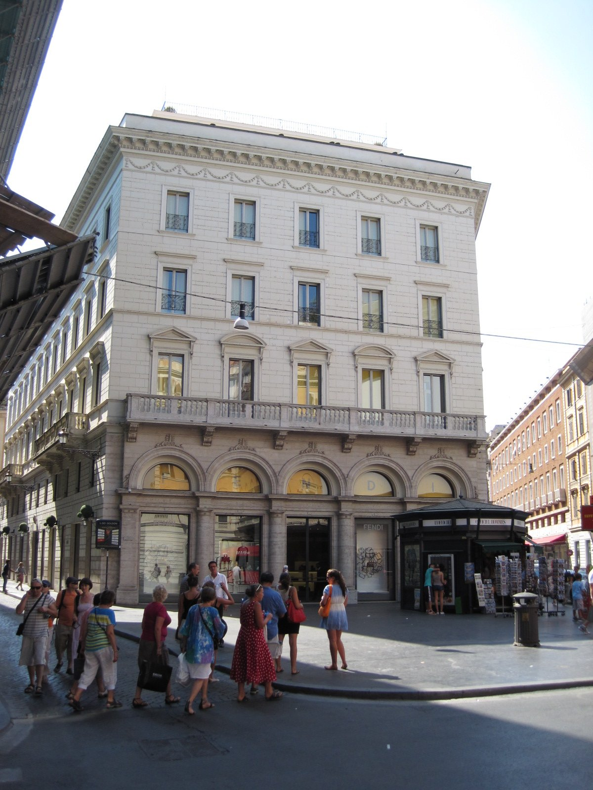 Boutique Fendi de Rome